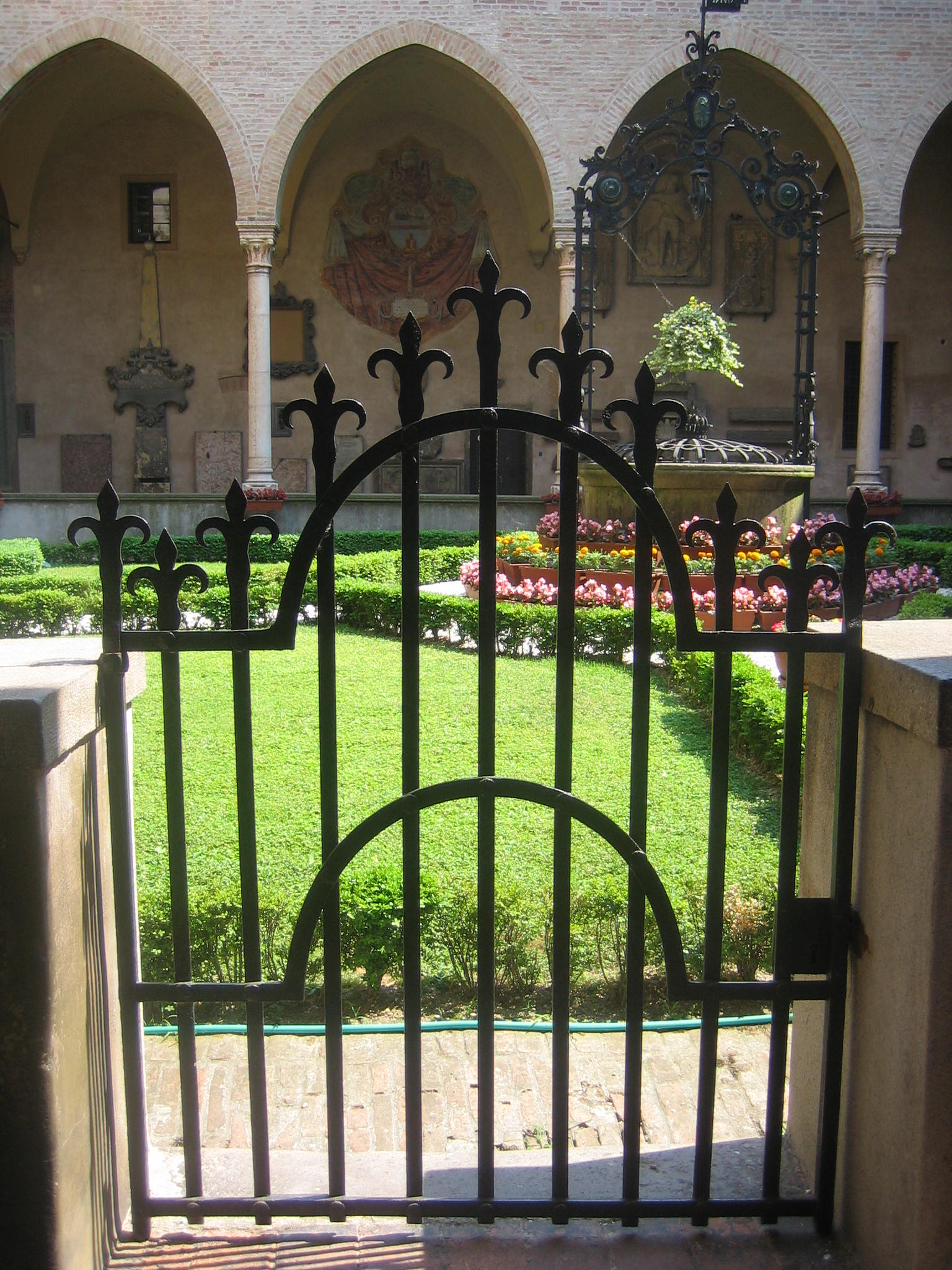 Kreuzgang an der Antoniusbasilika in Padua